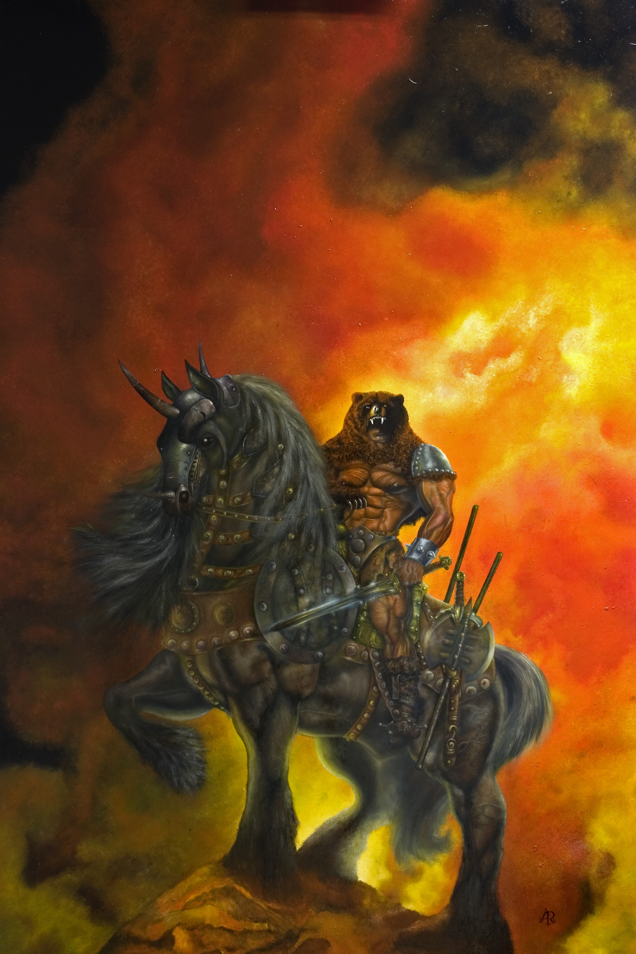 Berzerker viking harcos